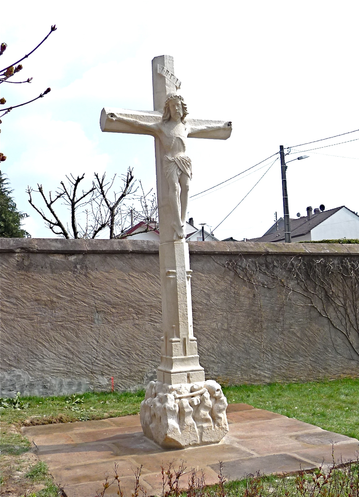 croix monumentale gothique flamboyant de l'ancien cimetière Notre-Dame, renovée et déplacée au cimetière de la Haute-chapelle à Raon-l'Étape 88110